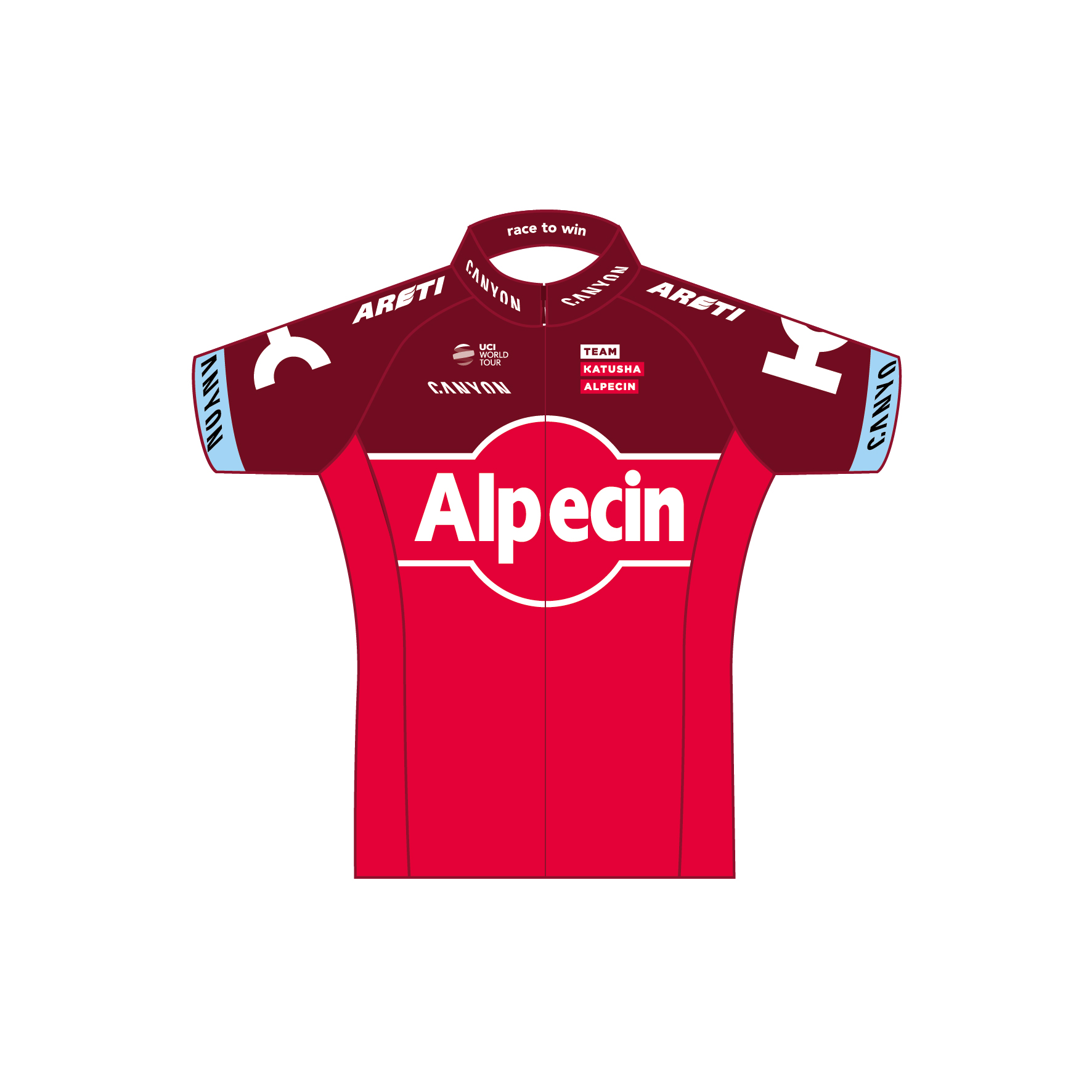 Форма Катюши в 2017 году